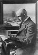 Вилли Штёвер (не удалось найти более крупное фото)